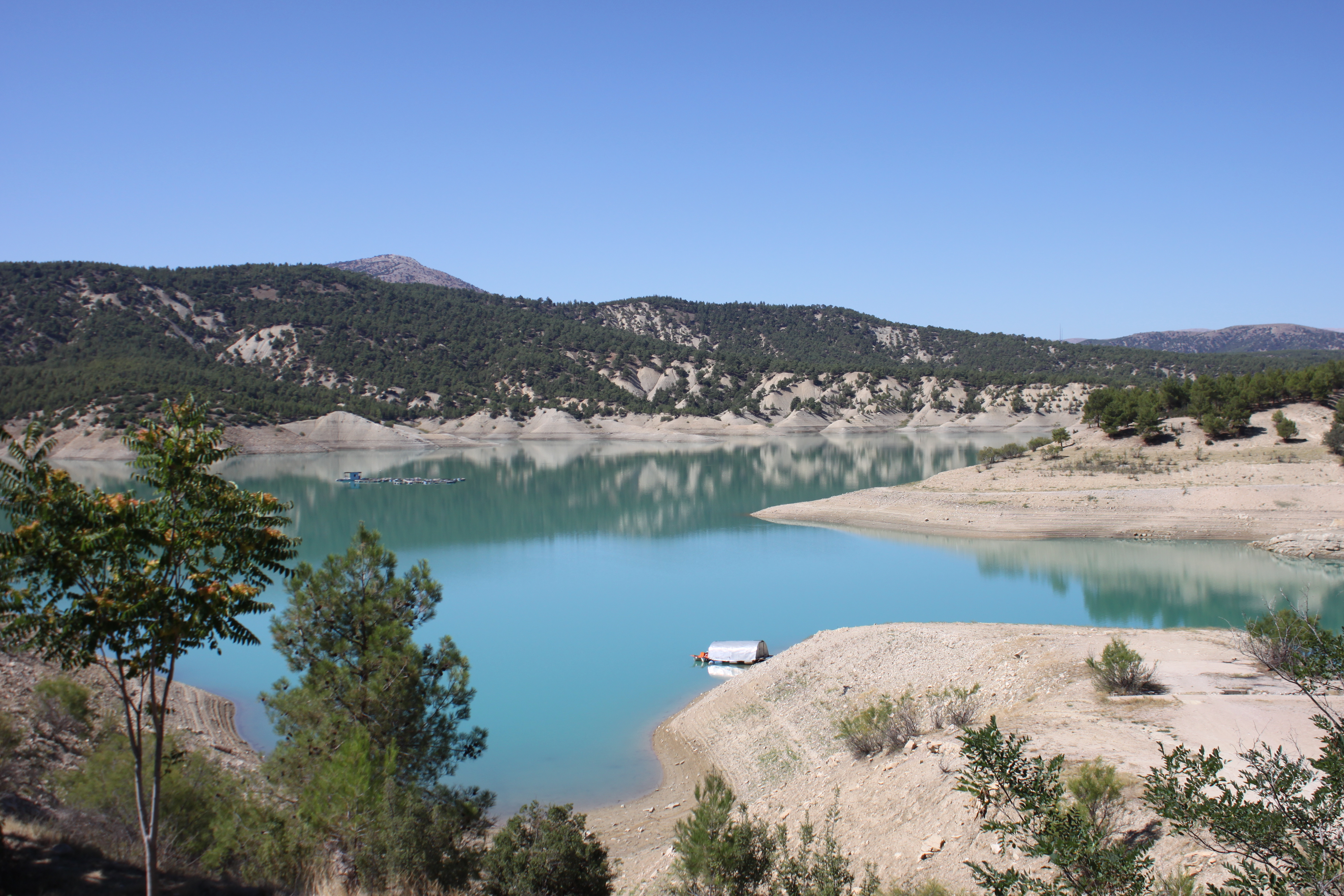 Der Fluss Korkuteli wurde im Westen der Stadt zu einem See aufgestaut.